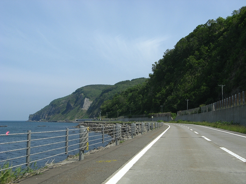 国道231号沿線風景 石狩市浜益